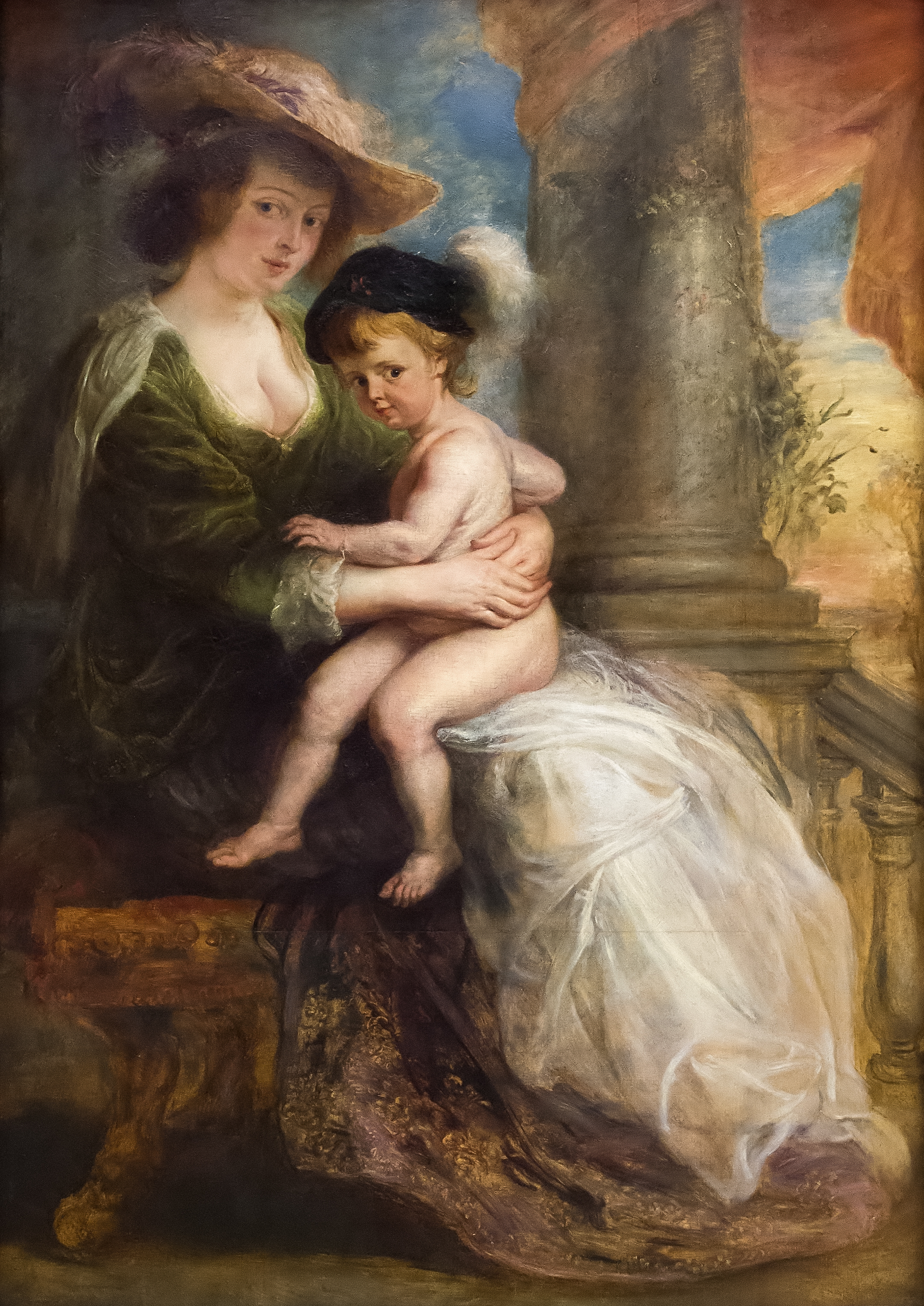 Peter Paul Rubens (1577-1640) Hélène Fourment met haar oudste zoon Frans - Alte Pinakothek